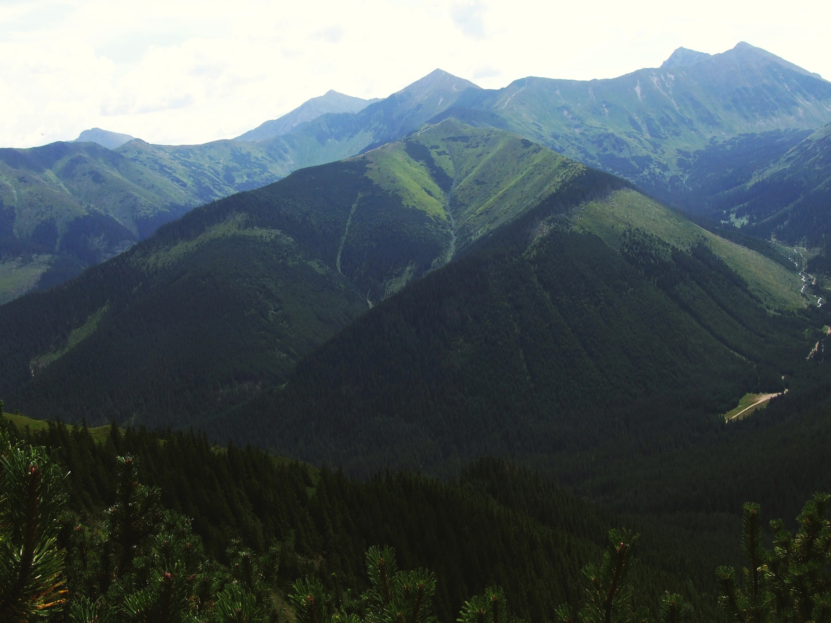 Trzydniowiański Wierch, widok z Bobrowca